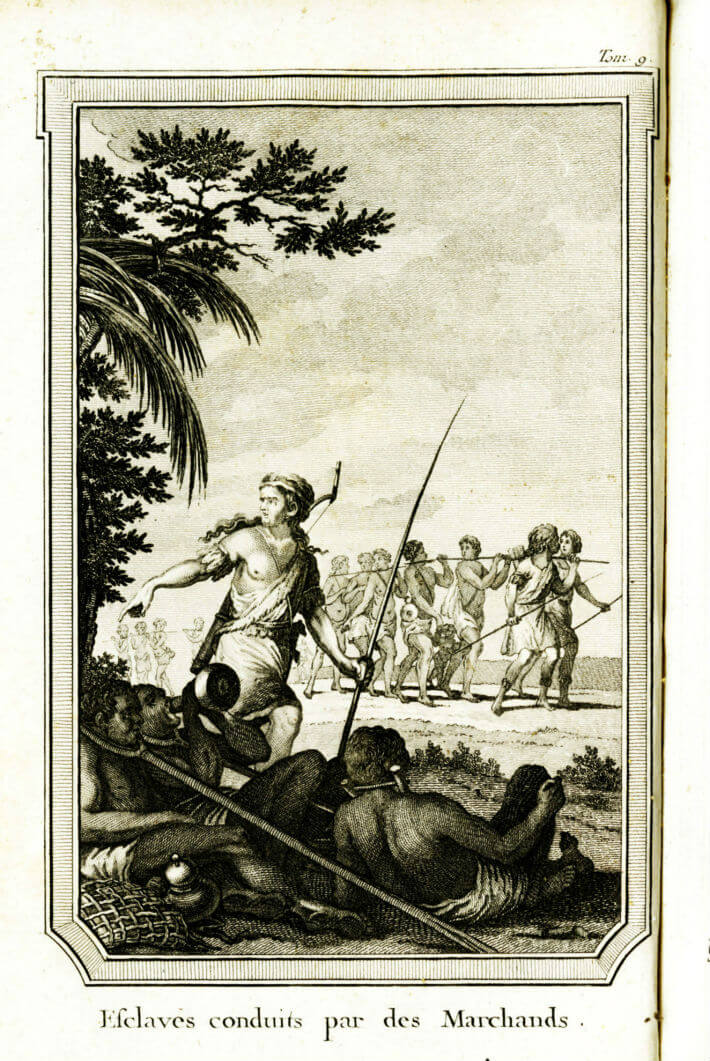 Gravure tirée de l'ouvrage de Raynal (abbé Guillaume-Thomas), Histoire philosophique et politique des établissements et du commerce des Européens dans les deux Indes. Tome VII. Neuchatel et Genève, Les libraires associés, 1783. Arch.dép.Char.Mar, PF. 2453